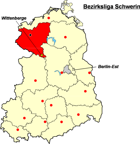 Localisation de Wittenberge dans la Bezirksliga Schwerin Catégorie:Logo de clubs de football - Allemagne